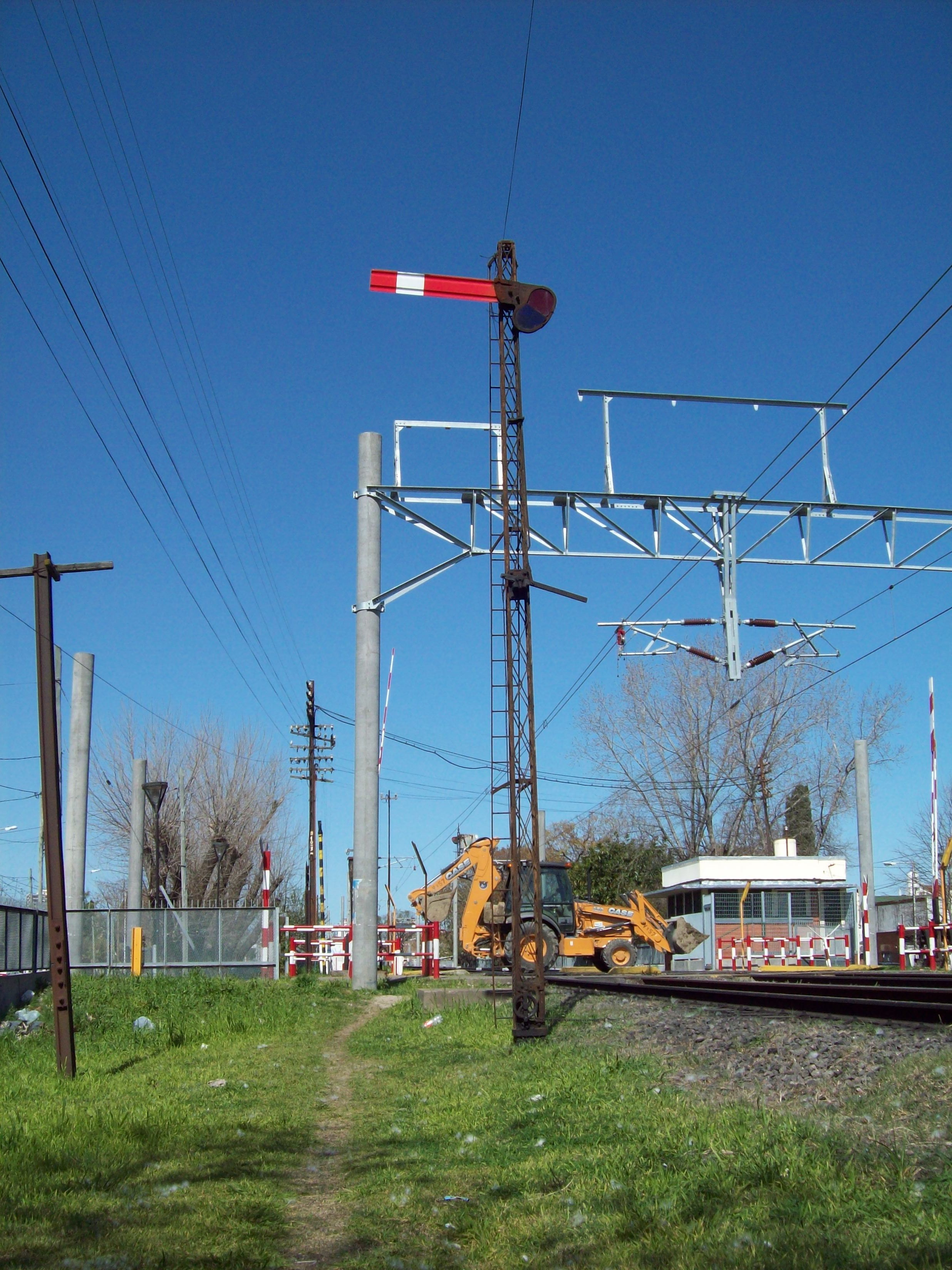 Obras de electrificación en estación Villa Dominico, del ferrocarril General Roca, durante 2015, momento en que el servicio diésel de Constitucion - La Plata/Bosques estuvo cortado.